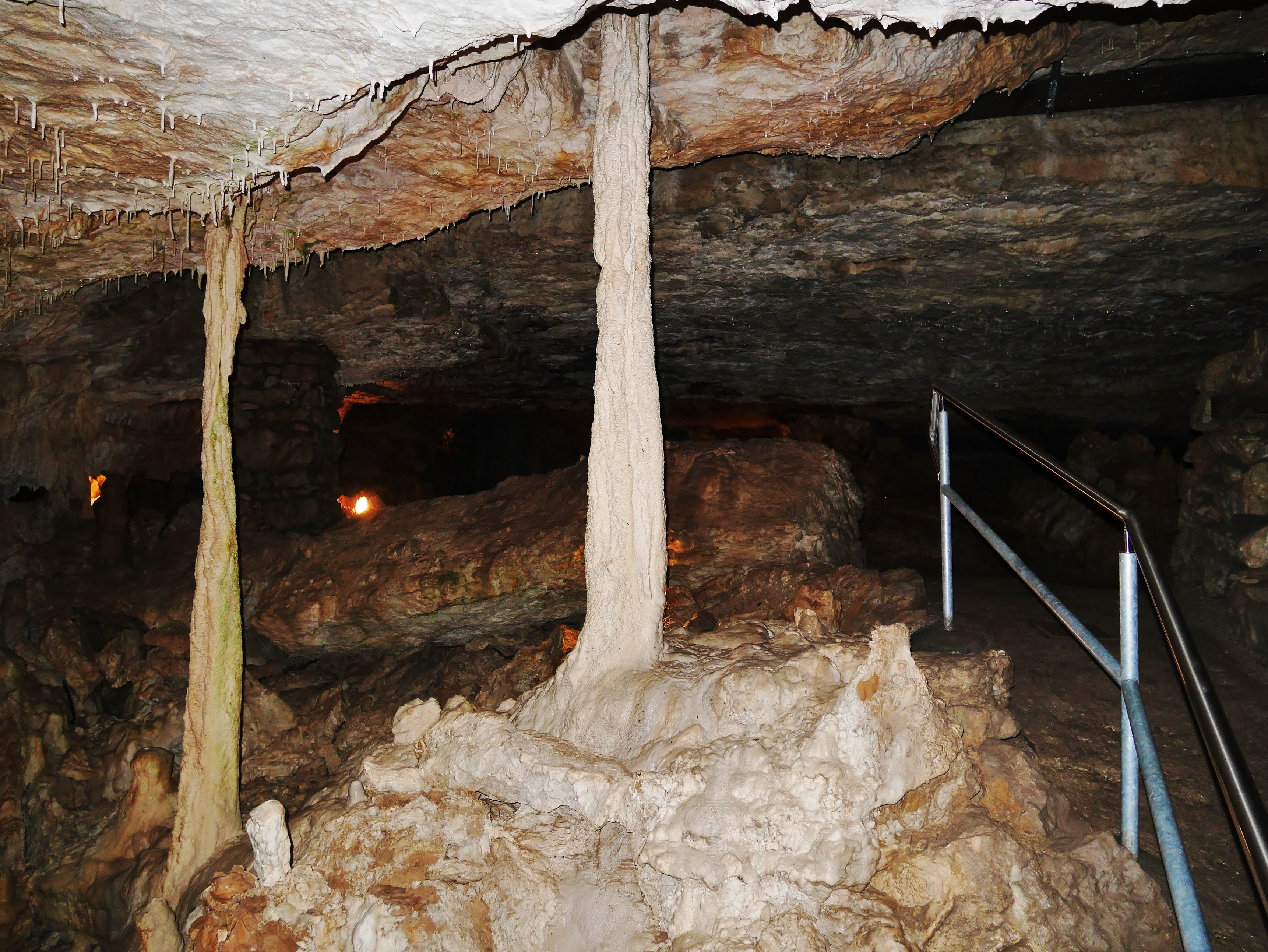 König-Otto-Tropfsteinhöhle